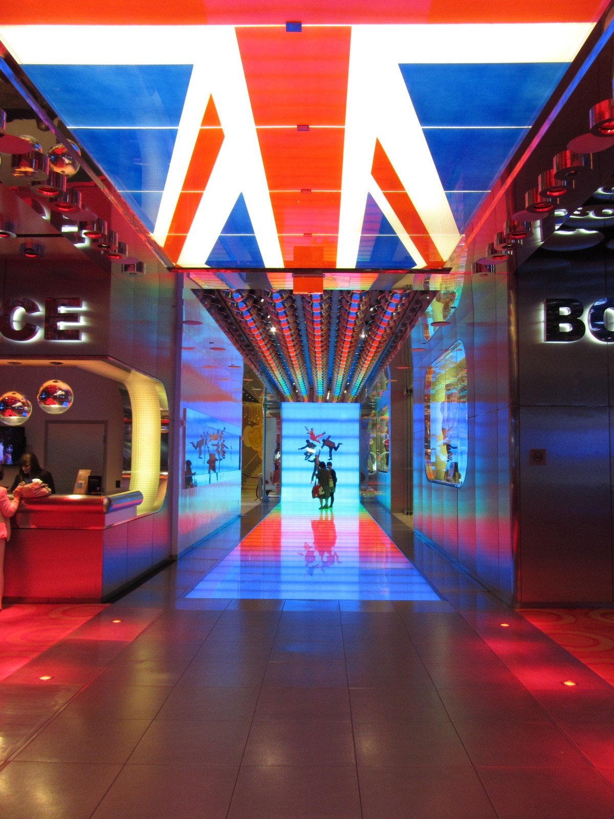 Cirque du Soleil Beatles LOVE Colorful Hallway